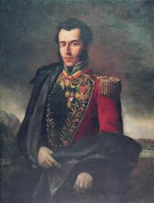 Gran Mariscal de Ayacucho Antonio José de Sucre; procer de Venezuela y fundador de Bolivia